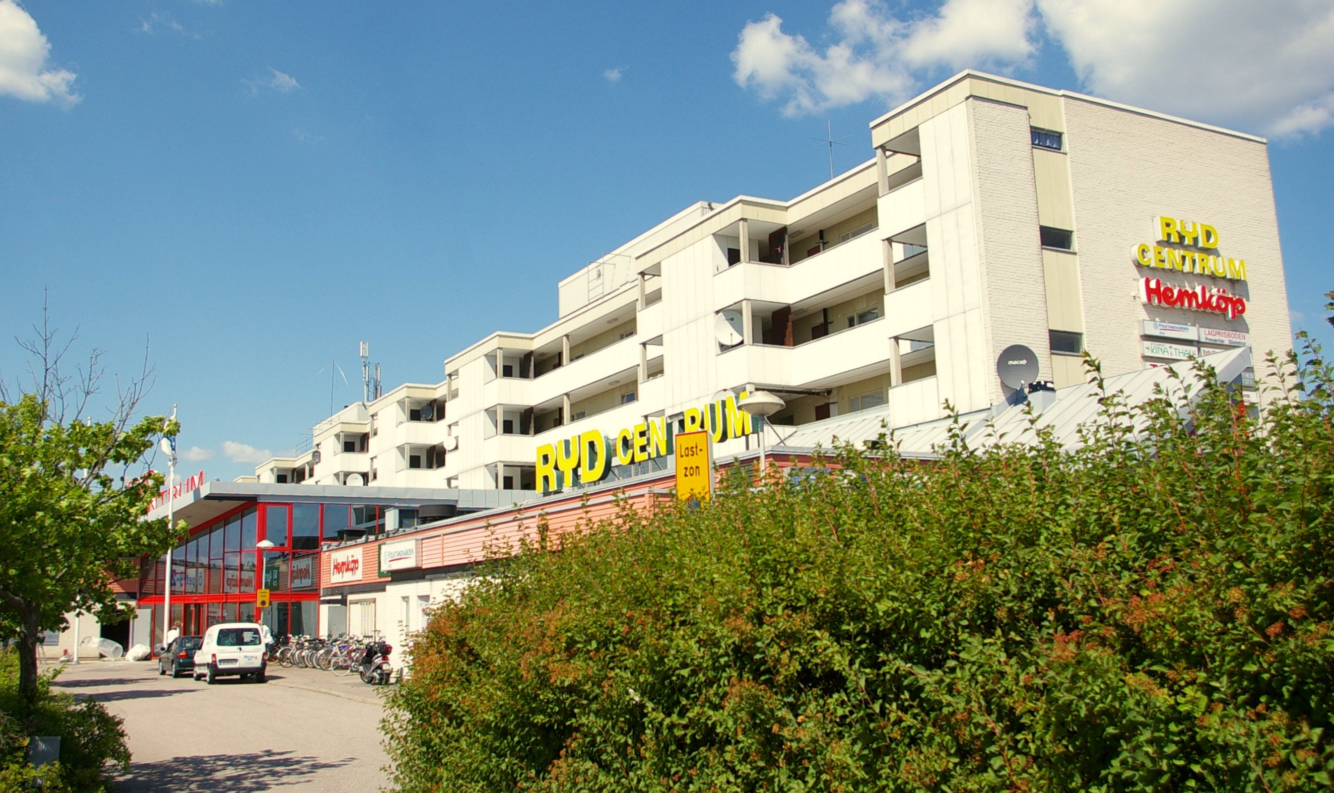 Ryd centrum. Köpcentrum i Ryd, Linköping. (Exteriör, Ryd Centrum)